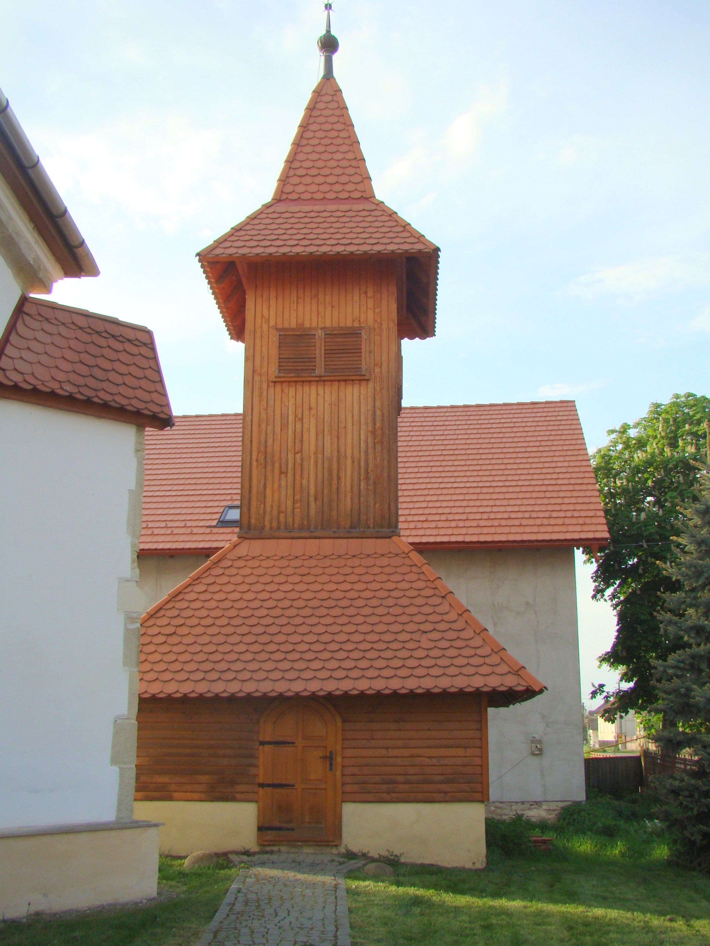 Turn clopotniță a bisericii reformate, sat Matei; comuna Matei 02